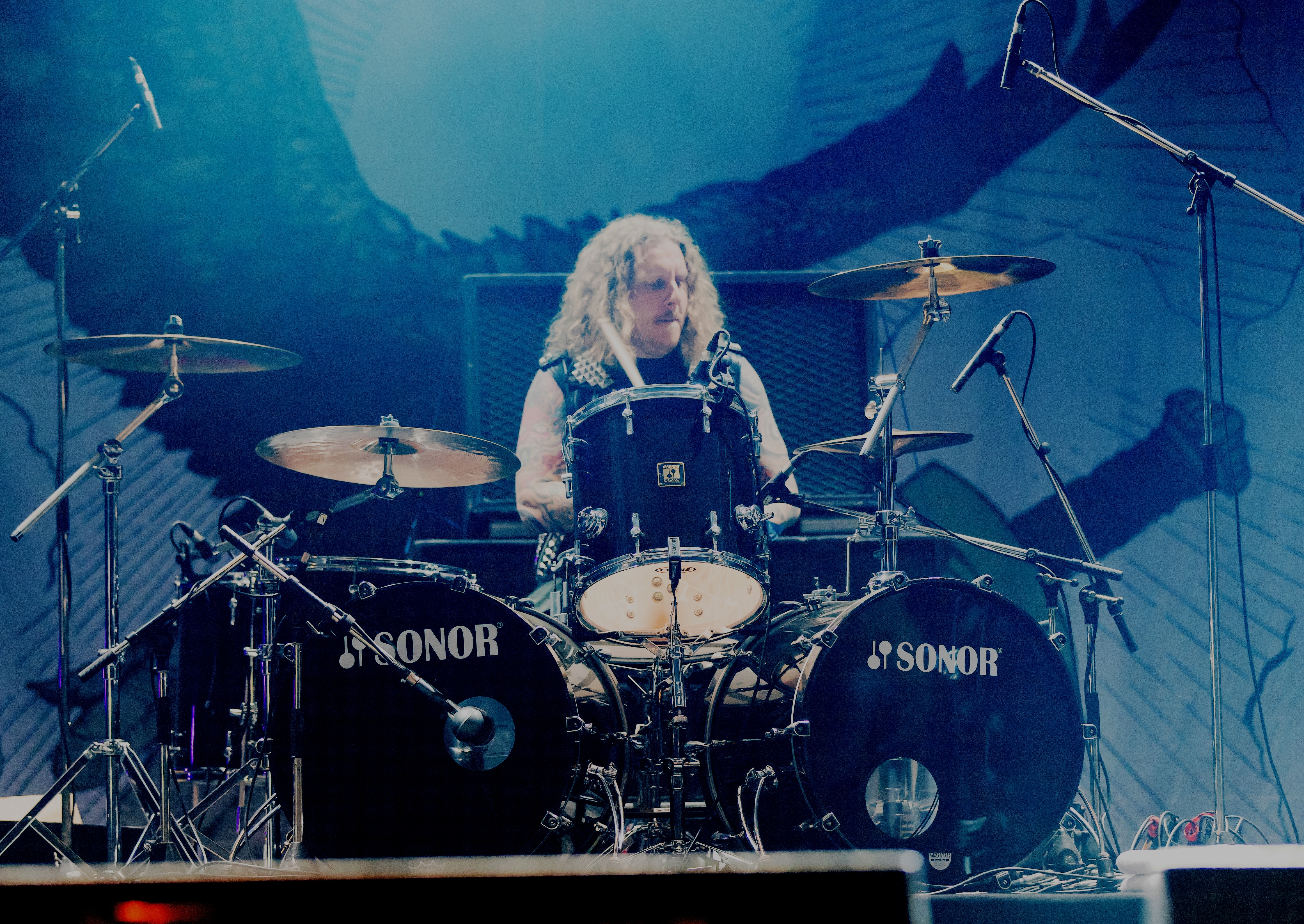 Grand Magus during Summer Breeze 2016 at , Dinkelsbühl, Bayern, Germany on 2016-08-17, Photo: Sven Mandel